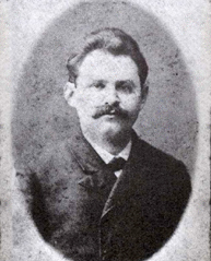 יצחק לייב גולדברג